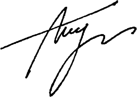 Роспись председателя Верховной Рады Украины Александра Турчинова